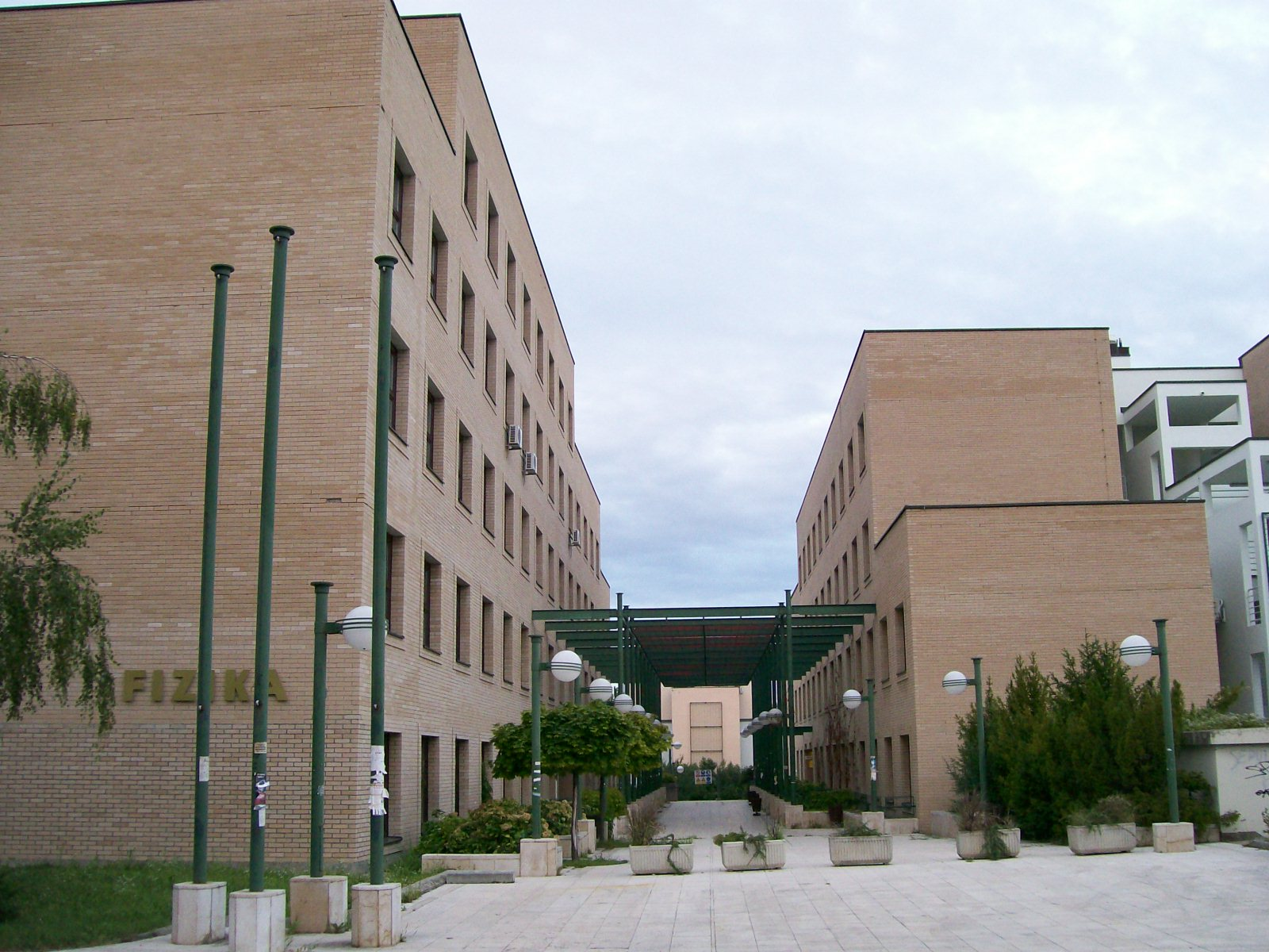 Zgrada Prirodoslovno-matematičkog fakulteta u Zagrebu, Šalata